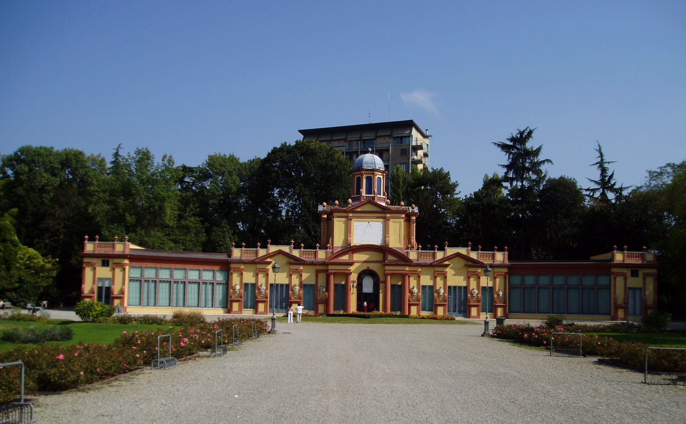 Palace in Modena, Giardino Ducale Estense